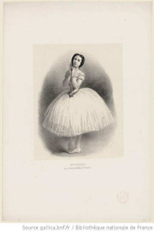 Amalia Ferraris